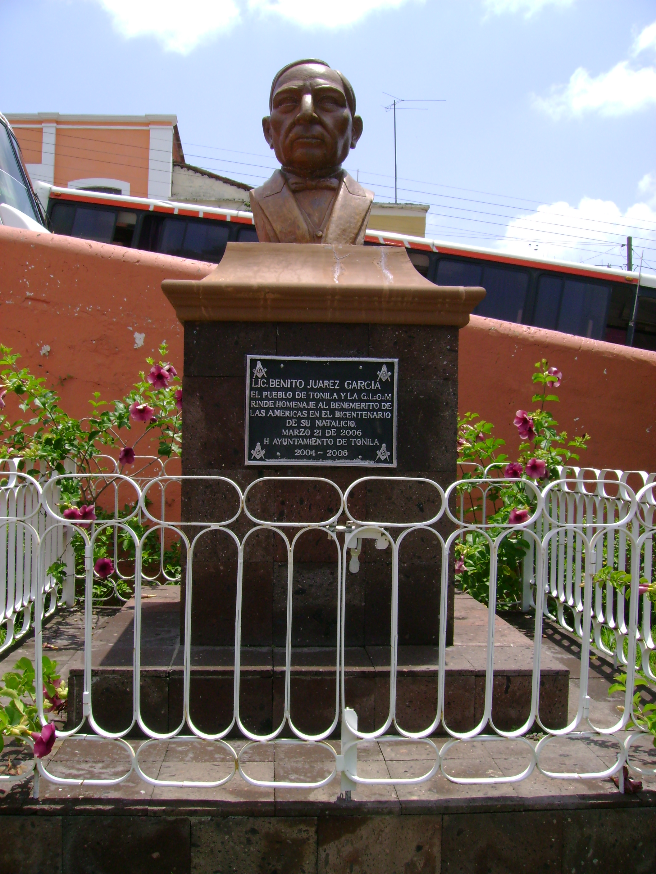 Monumento a Benito Juárez quién durmiera 1 noche en Tonila en su viaje hacia Manzanillo, en Colima.